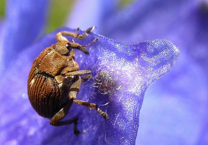 Mononychus punctum album, Gradignan, Gironde, France